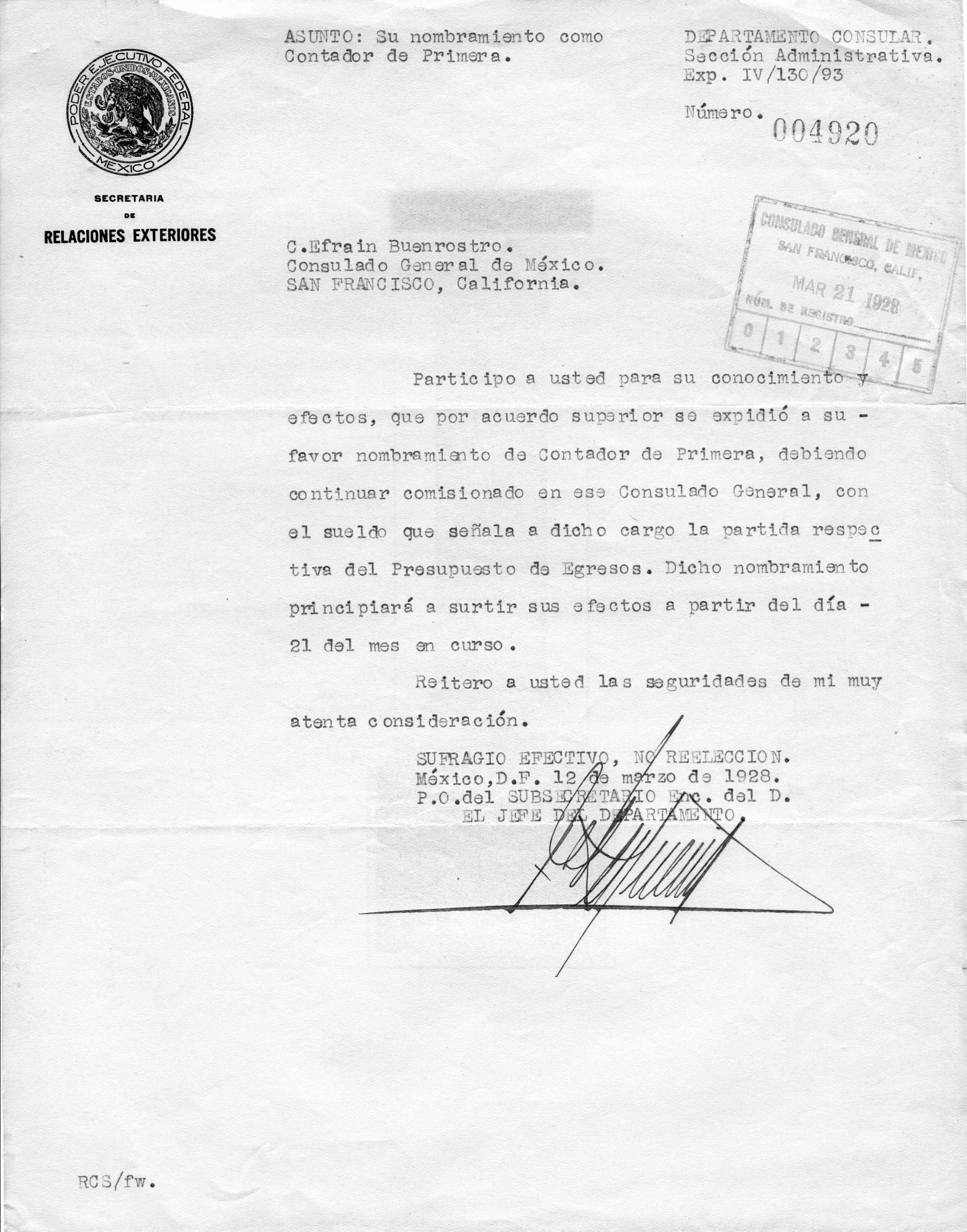 Nombramiento a Efrain Buenrostro como Contador de tercera en el Consulado de Mexico en San Francisco